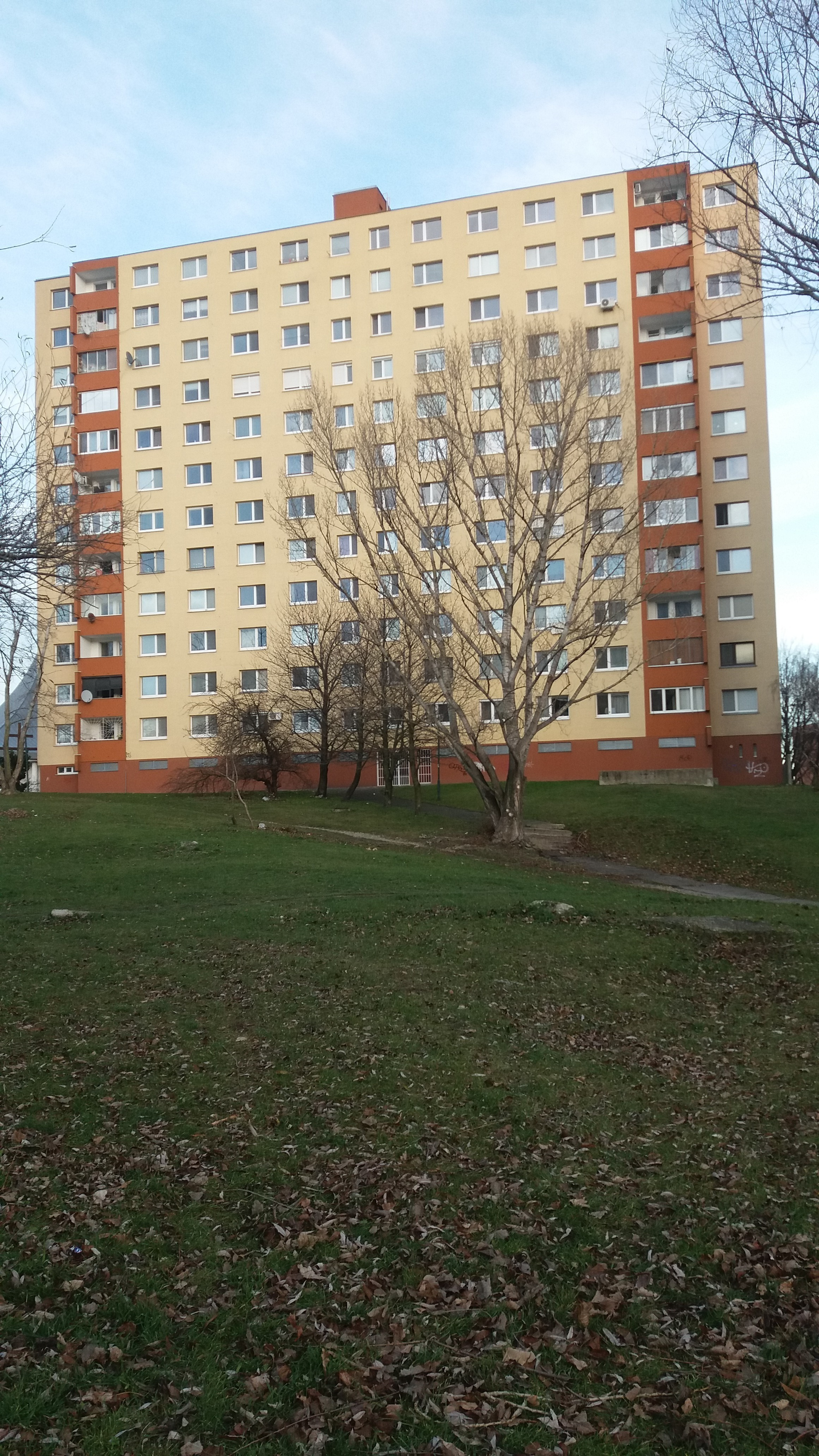 Panelák na Sídlisku Záluhy v Dúbravke